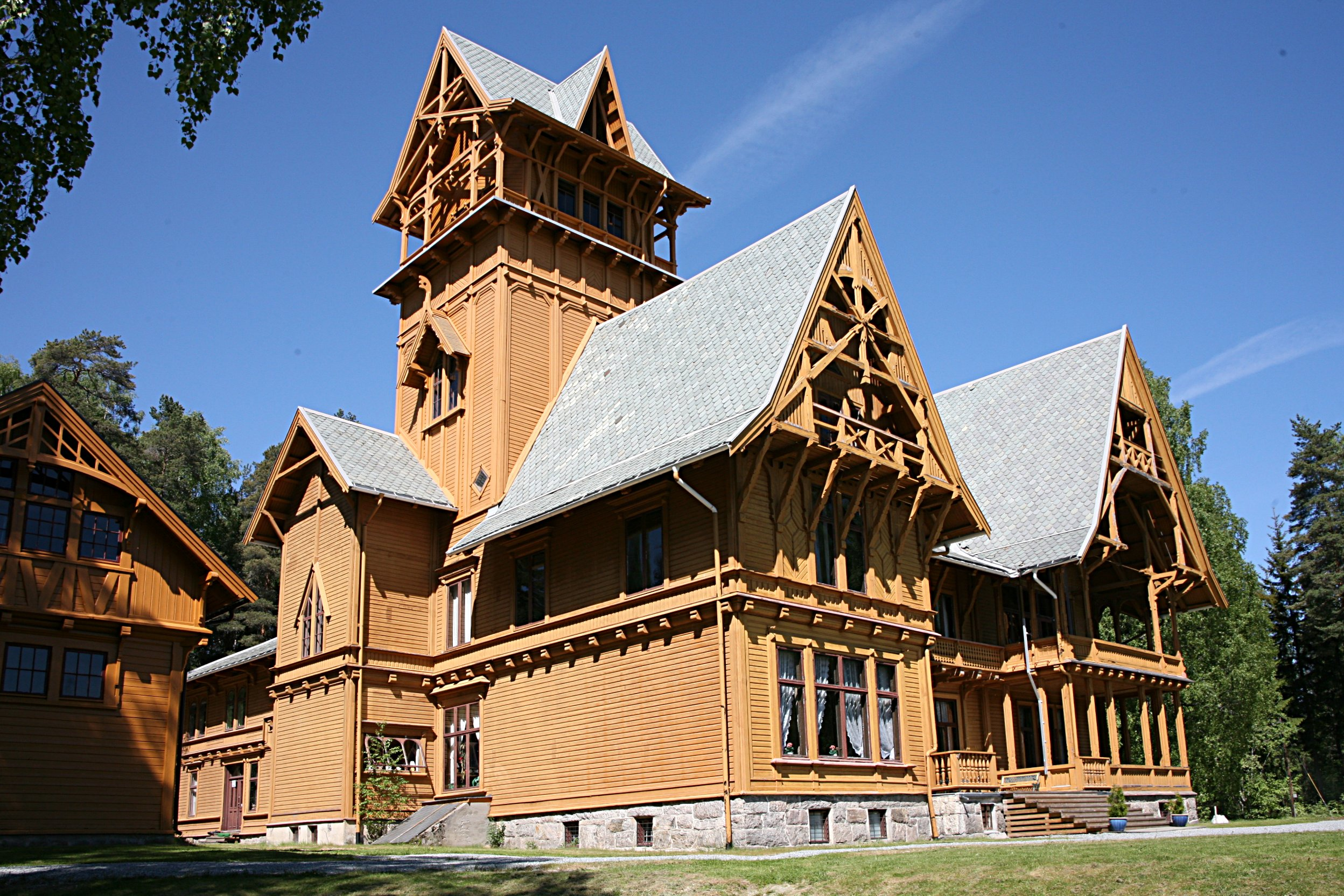 Villa Fridheim i Krødsherad oppført i årene 1890- 1892 tegnet av arkitekt Herman Major Backer.